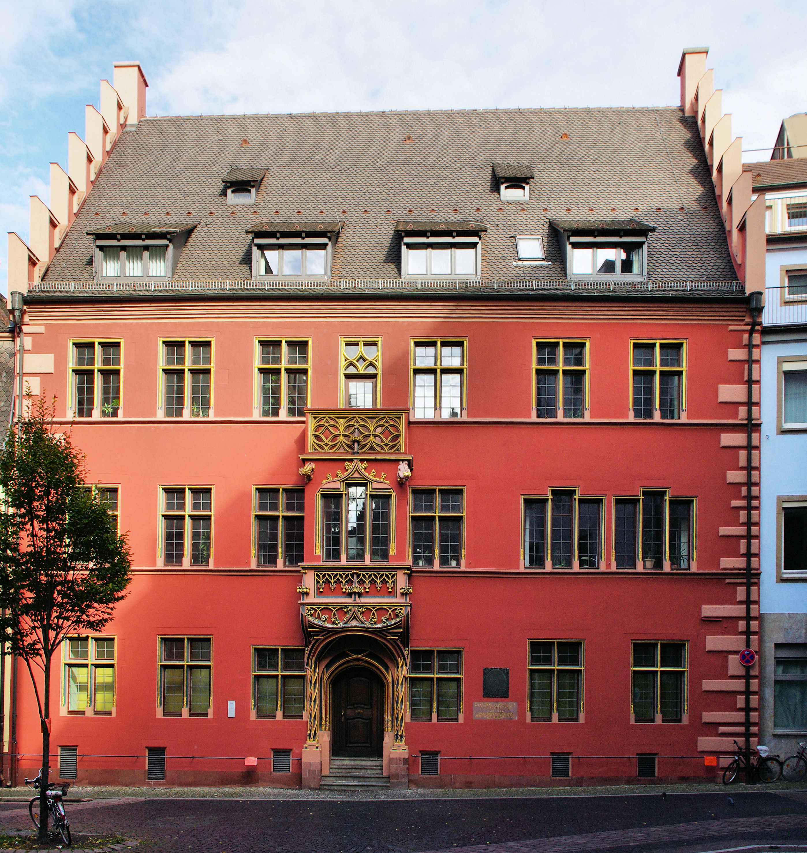 Historische Häuser in Freiburg